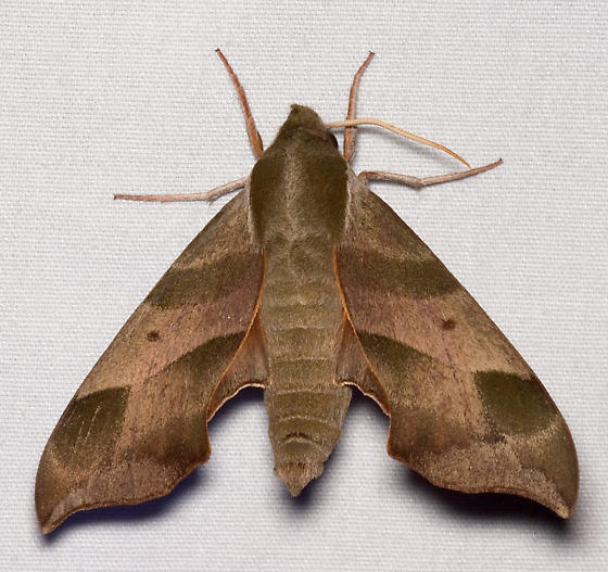 Darapsa myron